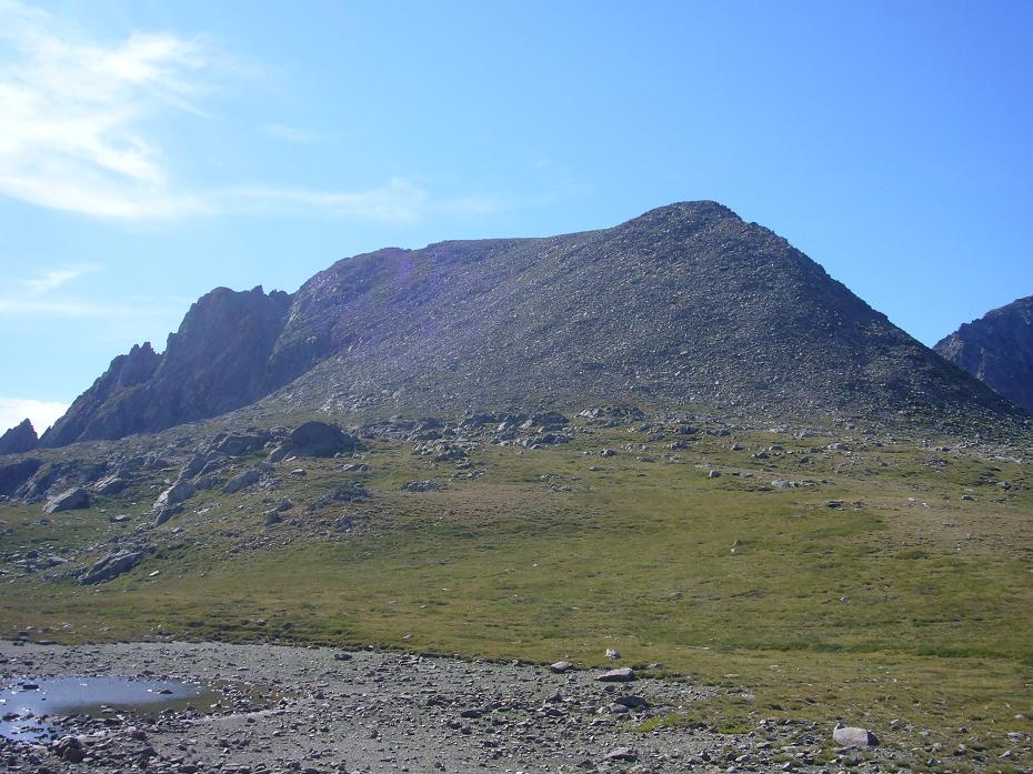 Agulla del Portarró vista des del Portarró d'Espot; Espot, Pallars Sobirà, Catalunya